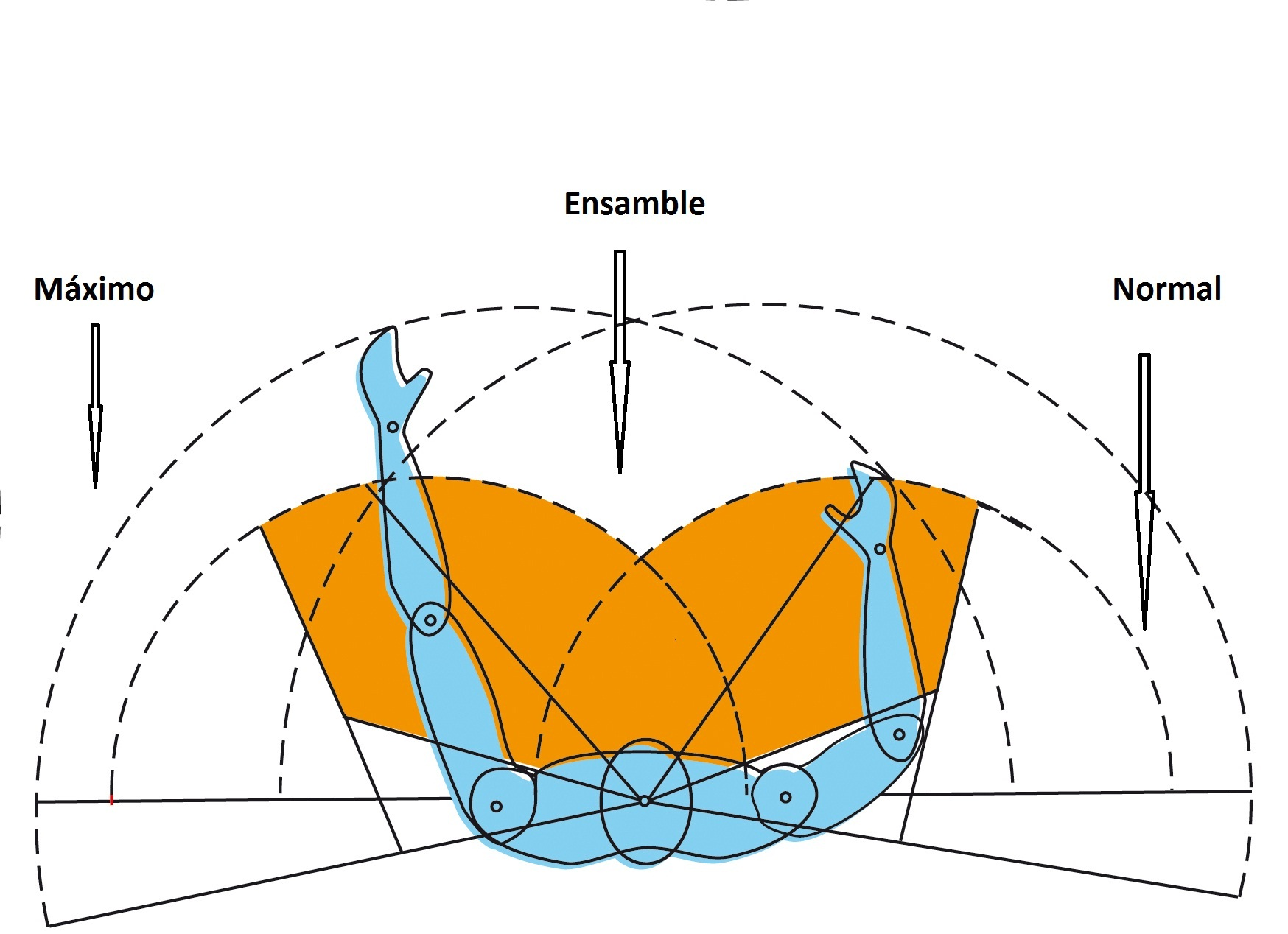 Ergonomia. Gizakion area eraginkorrak aldebiko simetriaren ardatzatik ikusiak.